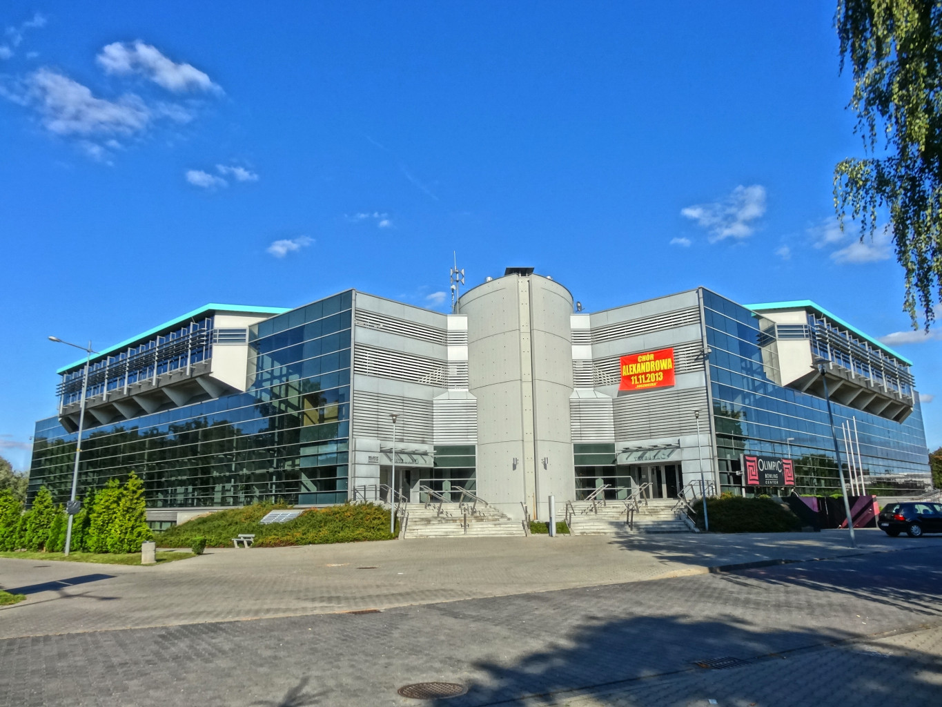 Hala widowiskowo-sportowa "Łuczniczka" w Bydgoszczy - widok od strony parkingu